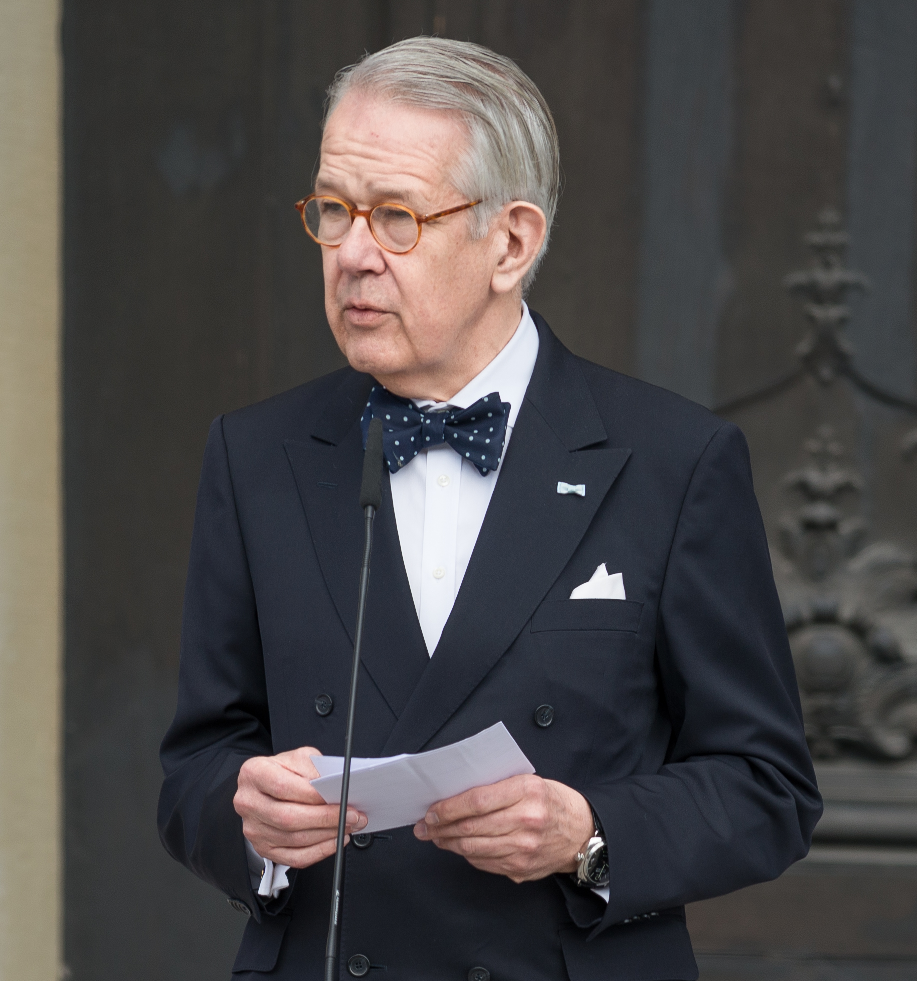 Svante Lindqvist i samband med öppnandet av Stockholms slott på nationaldagen den 6 juni 2017.